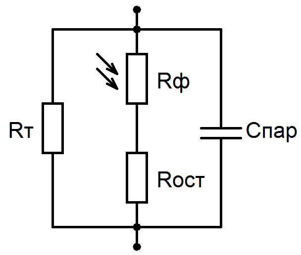 Эквивалентная схема фоторезистора Rт - темновое (большое) сопротивление Rост - остаточное (малое) сопротивление Rф - фоточувствительное сопротивление (в теории обратно пропорционально освещённости) Спар - паразитная ёмкость утечки